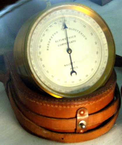 barometro olosferico altimetrico - proprietà Società Geografica Italiana